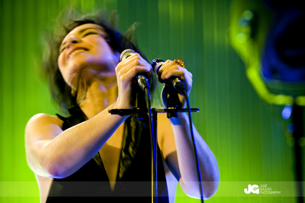 Aula Magna em Lisboa, 06 dezembro 2007